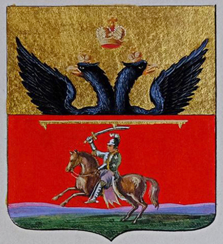 Беларуская (тарашкевіца): Чэрыкаў (Čerykaŭ). Герб места з Пагоняй (Pahonia)